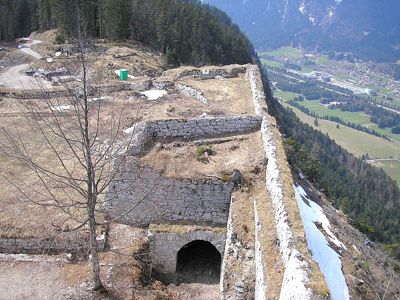 Festung Schlosskopf bei Reutte (Tirol). Nordflanke des Vorwerks mit dem Tunnel des Vortores.